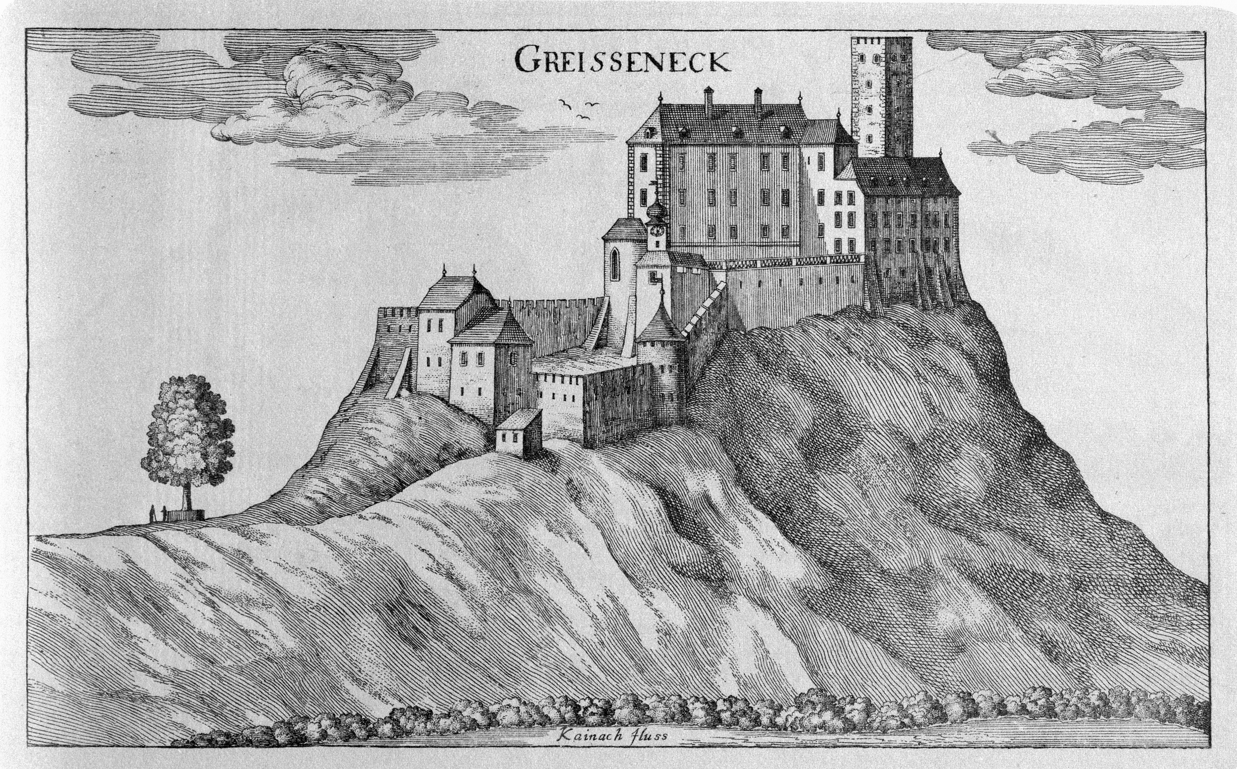 G. M. Vischers Käyserlichen Geographi, Topographia Ducatus Stiriae, Das ist: Eigentliche Delineation / und Abbildung aller Städte / Schlösser / Marcktfleck / Lustgärten / Probsteyen / Stiffter / Clöster und Kirchen / so es sich im Herzogthumb Steyrmarck befinden; Und anjetzo Umb einen billichen Preyß zu finden seynd Bey Johann Bitsch Universitäts Buchhandlern / Auff dem Juden=Platz bey der guldenen Saulen. Graz 1681 Die Nummerierung der Dateien folgt der alphabetischen Reihung der Ortsnamen